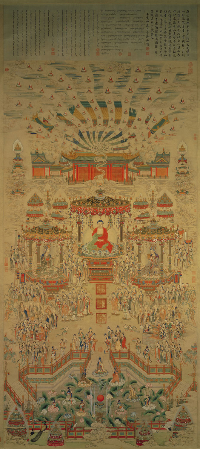 清丁观鹏《极乐世界庄严图》，现藏于台北故宫博物院。